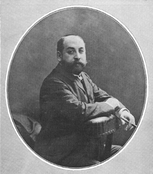 Retrato de Manuel Linares Rivas, obra del fotógrafo Kaulak, recogido en la revista española El arte de el teatro.